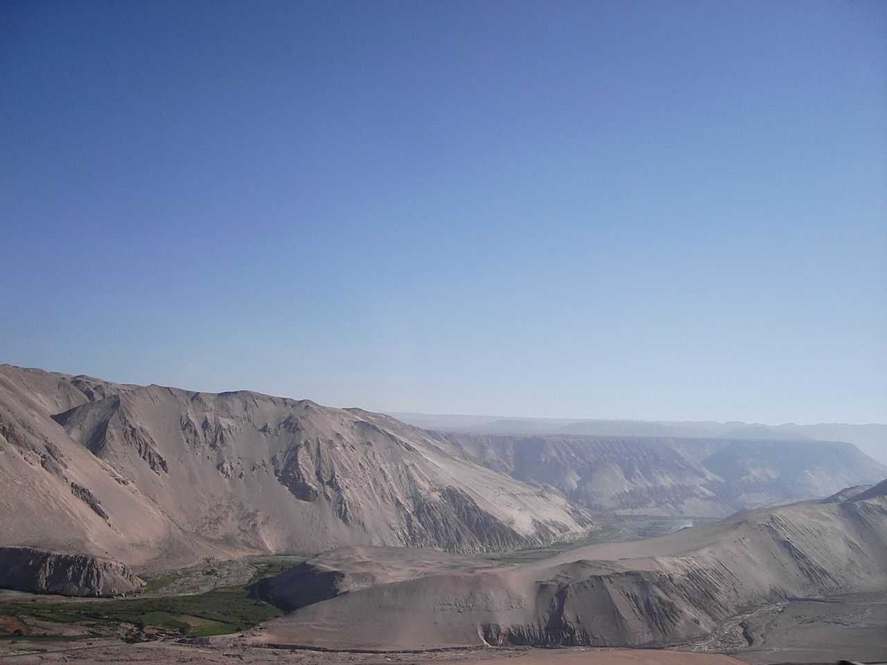 Foto tirada por mim, em Arica.